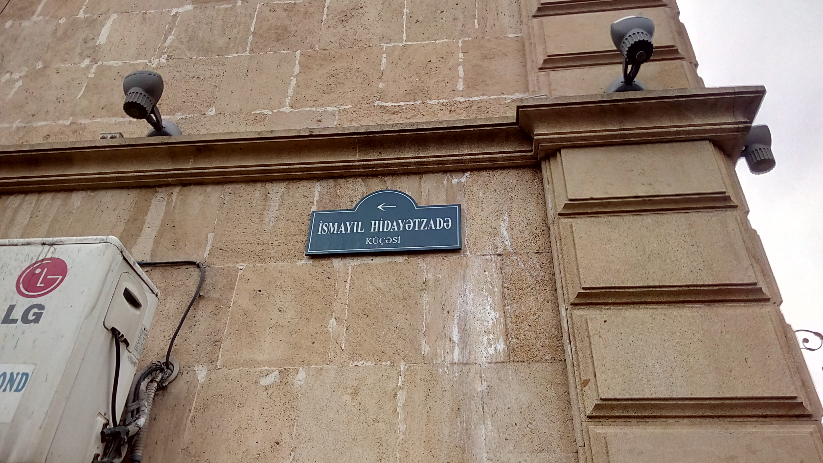 Bakı, İsmayıl Hidayətzadə küçəsi